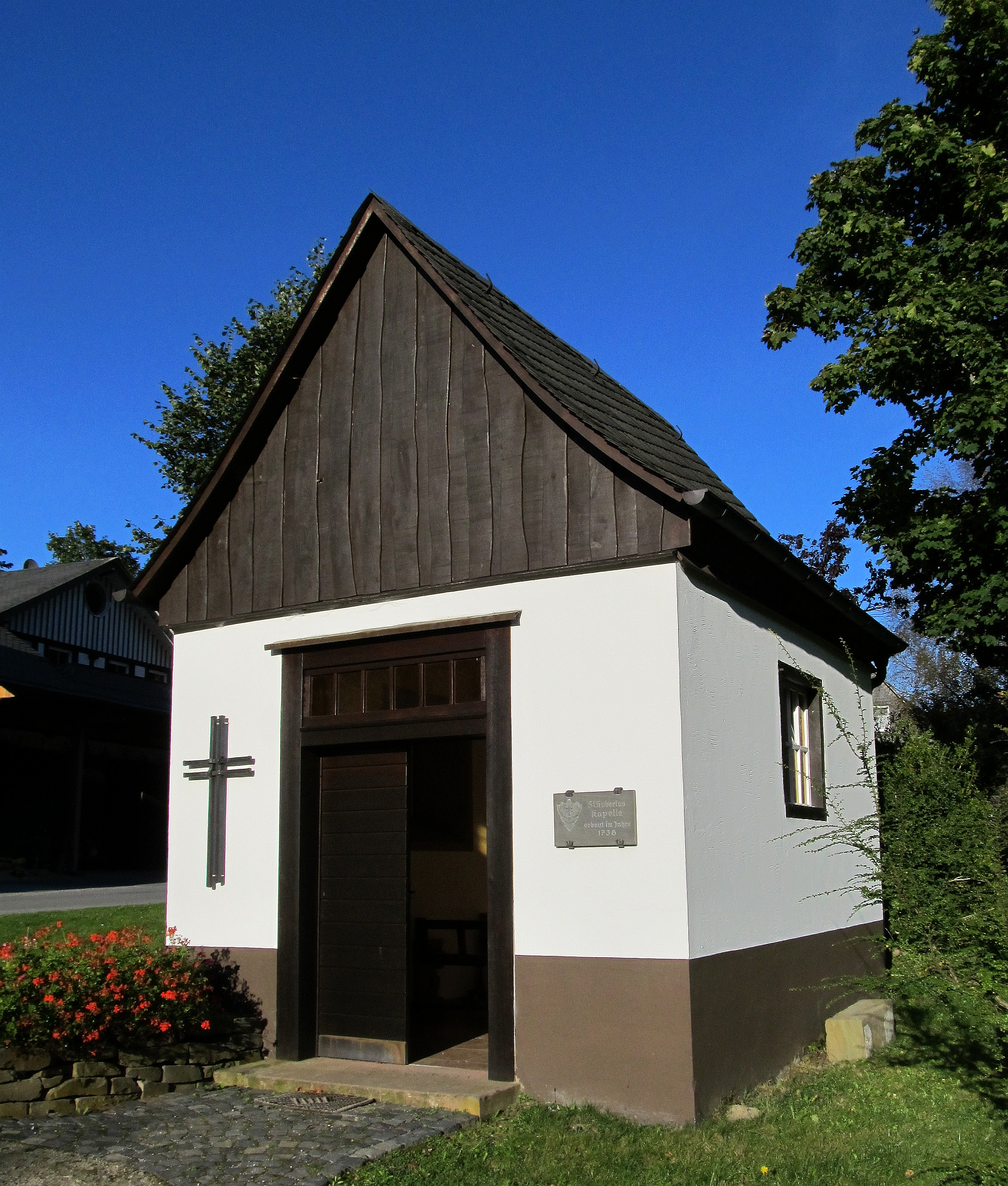 St. Hubertus Kapelle, Anno 1738, Schmallenberg-Latrop (Germany)